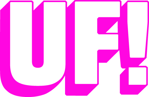 Unga Feministers logga i rosa